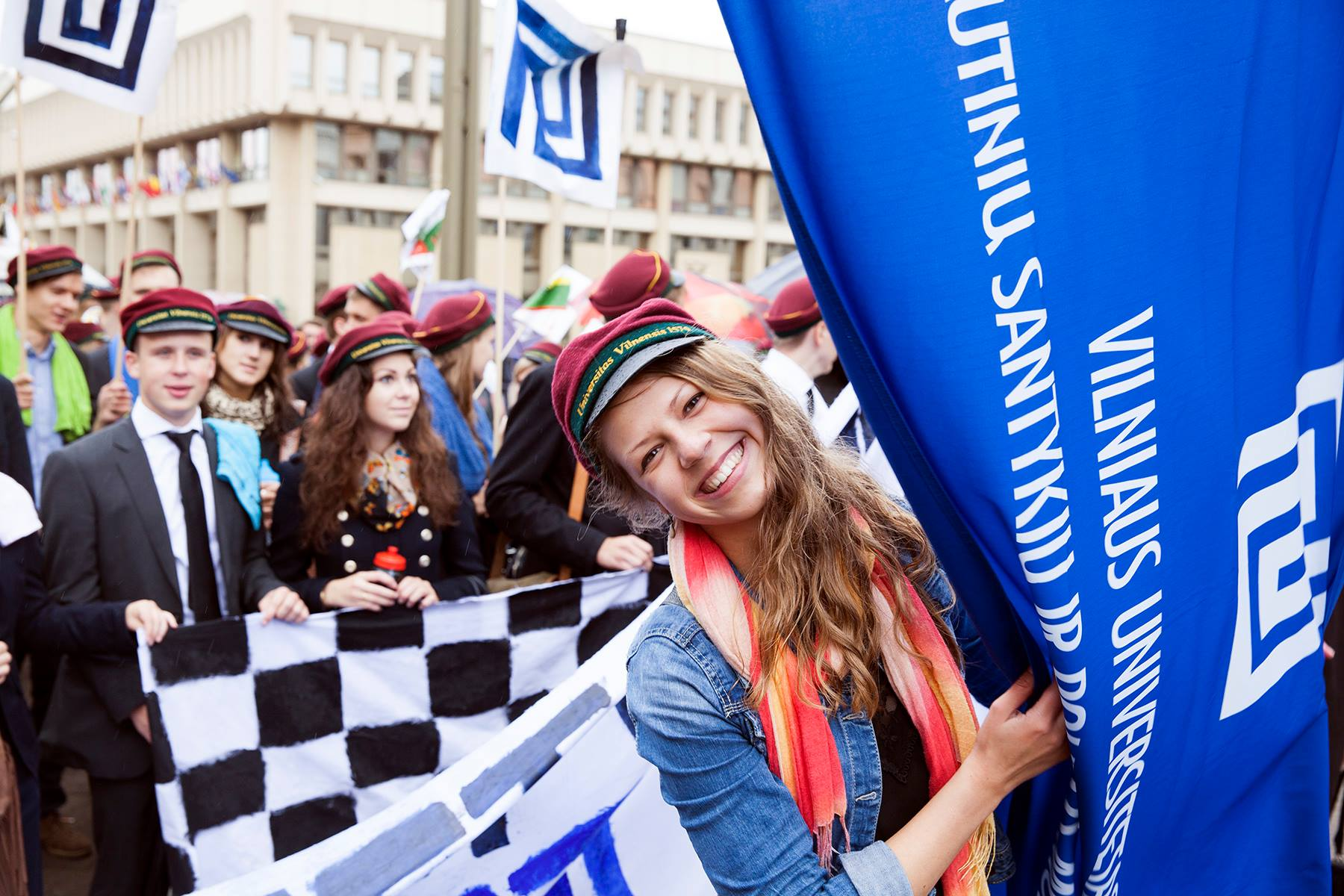 Rugsėjo -oji